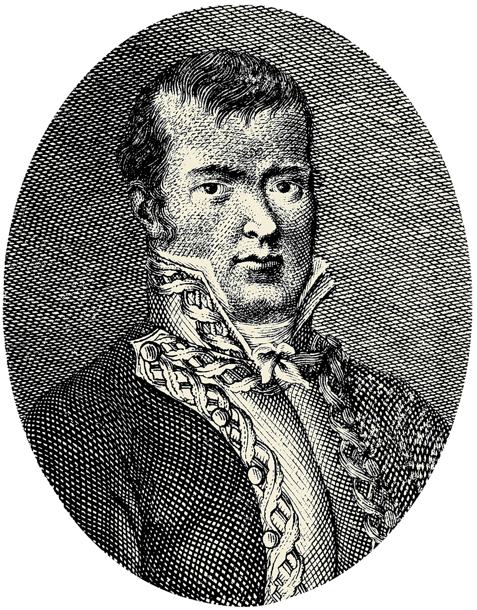 a Biblioteca Nacional de la U.N.A.M. es la depositaria actual de este grabado, publicado en la Historia militar del general don José María Morelos, escrita por Carlos María de Bustamante en 1825.